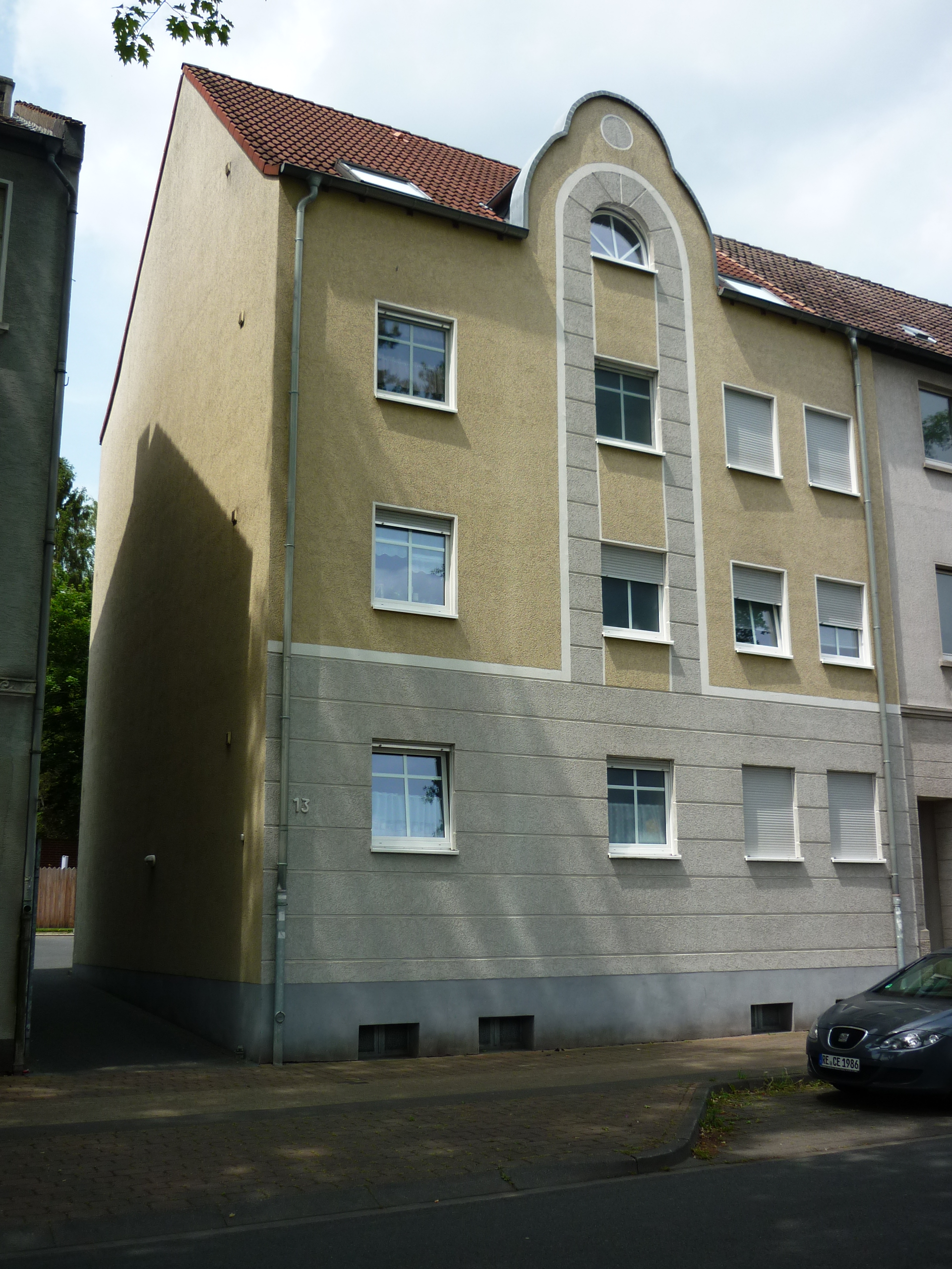 Stolpersteinlage Datteln Münsterstraße 13